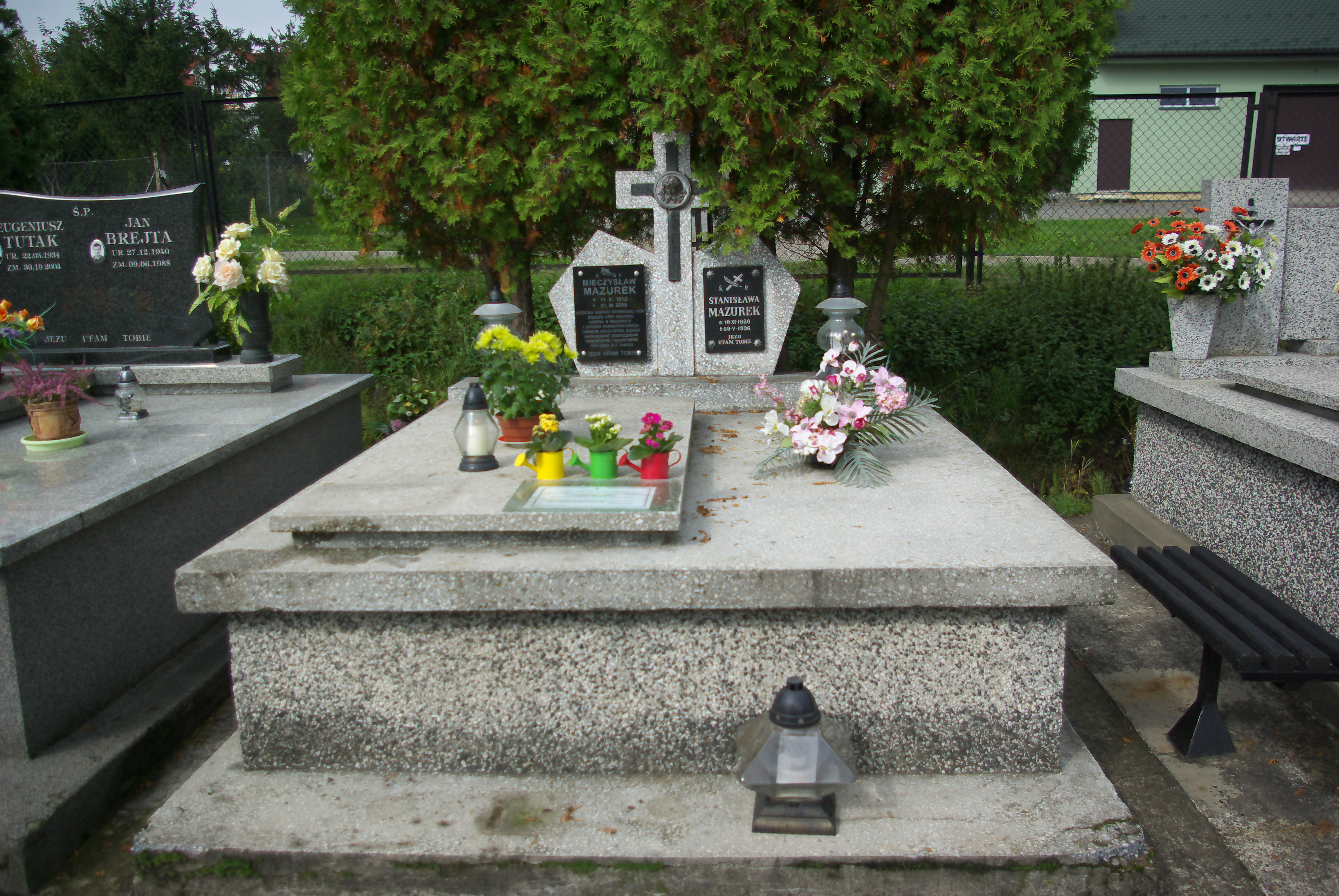 Grobowiec Mieczysława i Stanisławy Mazurków na Cmentarzu Centralnym w Sanoku.